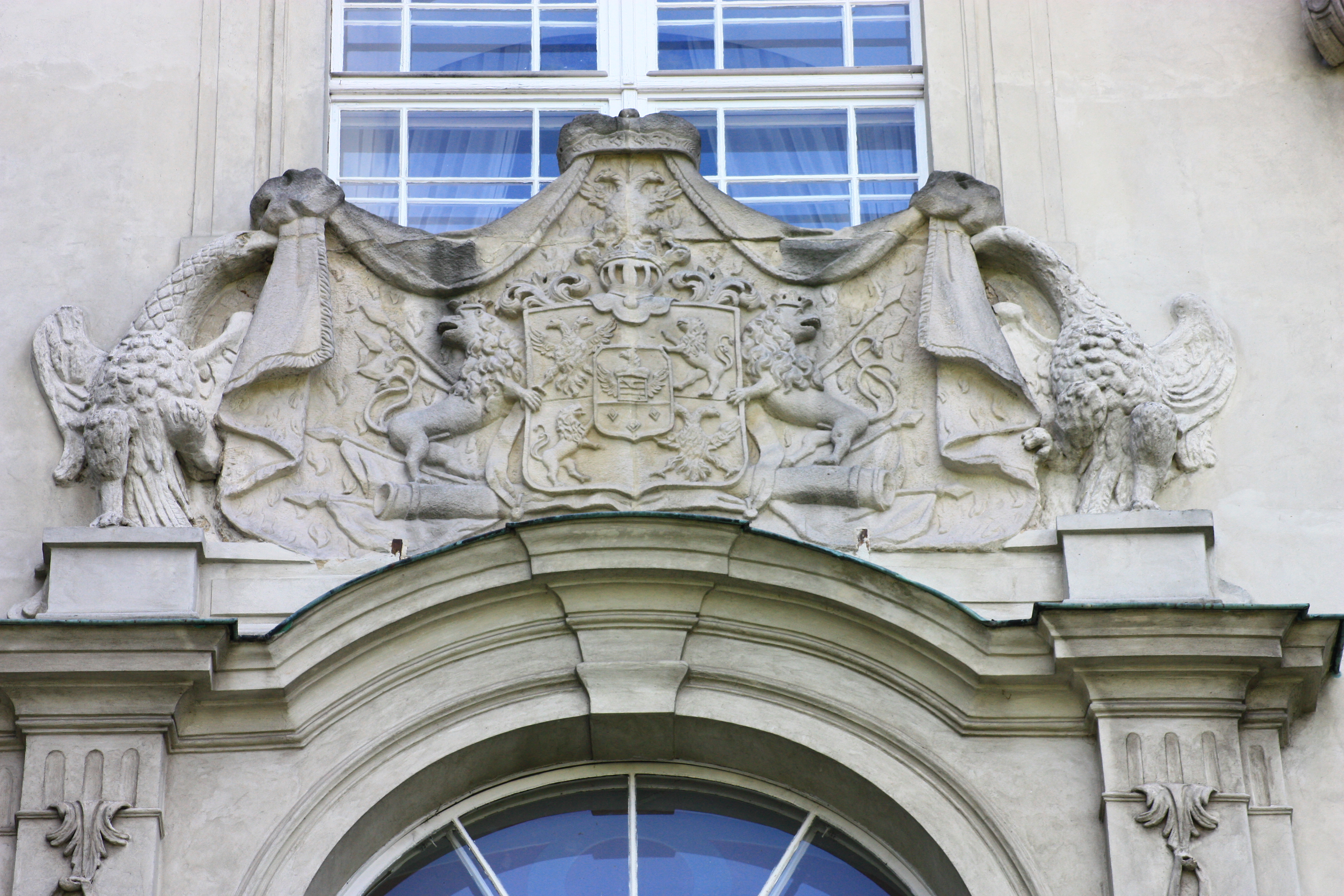 Rydzyna, zamek, XV, kon. XVII, XVIII, XX